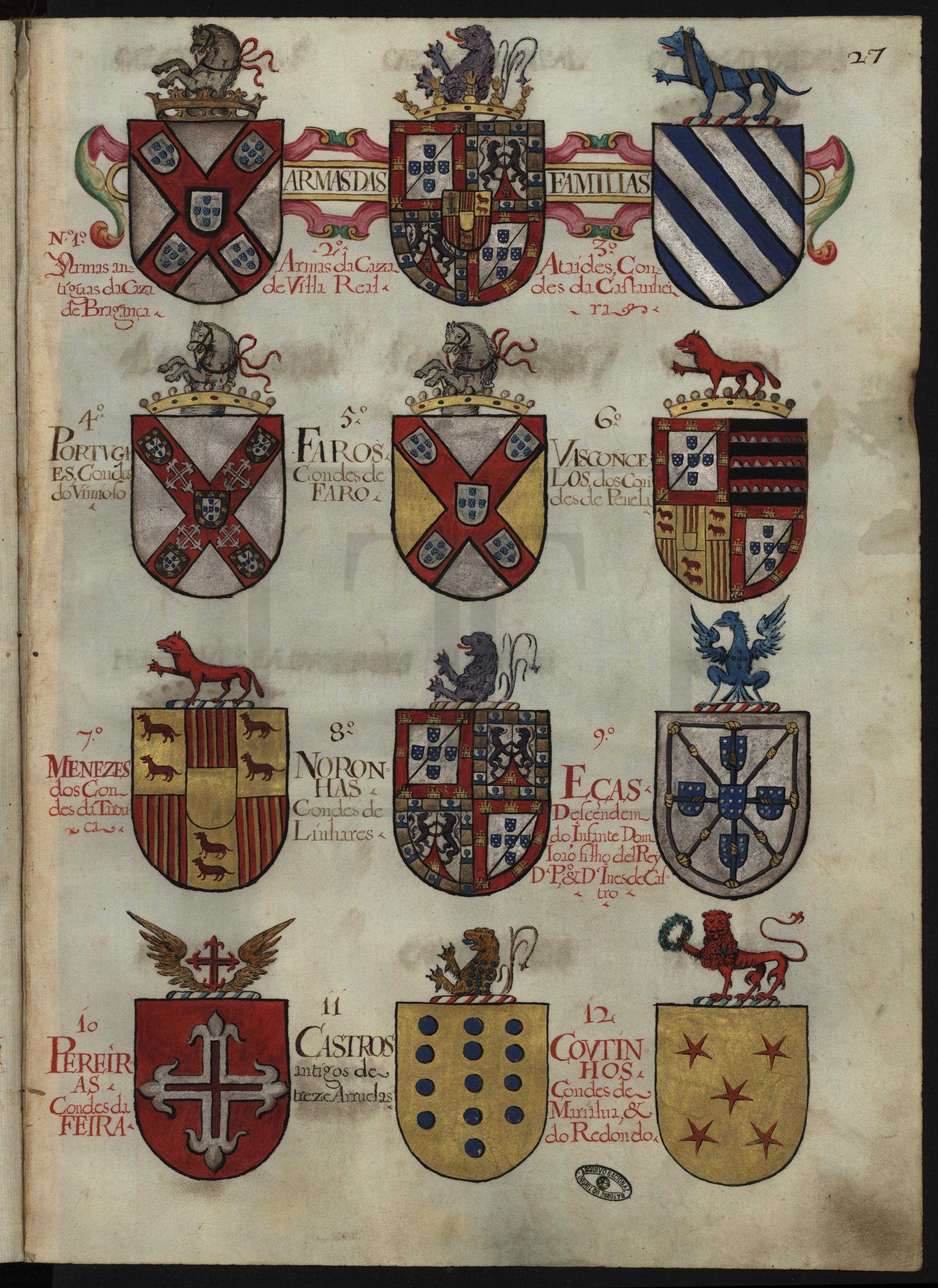 Thesouro de Nobreza, Armas das Famílias 1/40 (fl 27)